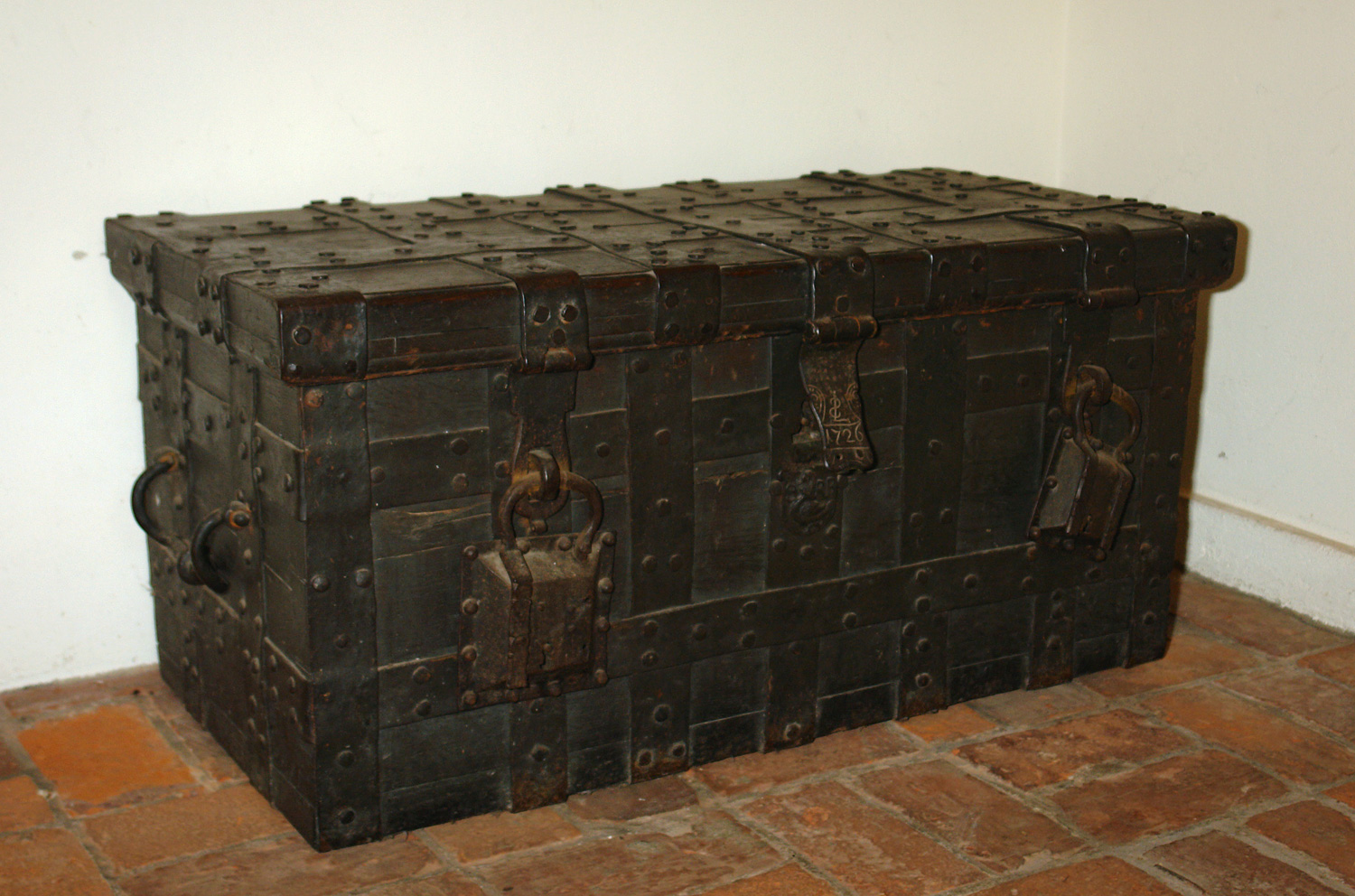 Kirche St. Lorenz (17.Jh.) in Lübeck-Travemünde: Truhe von 1726